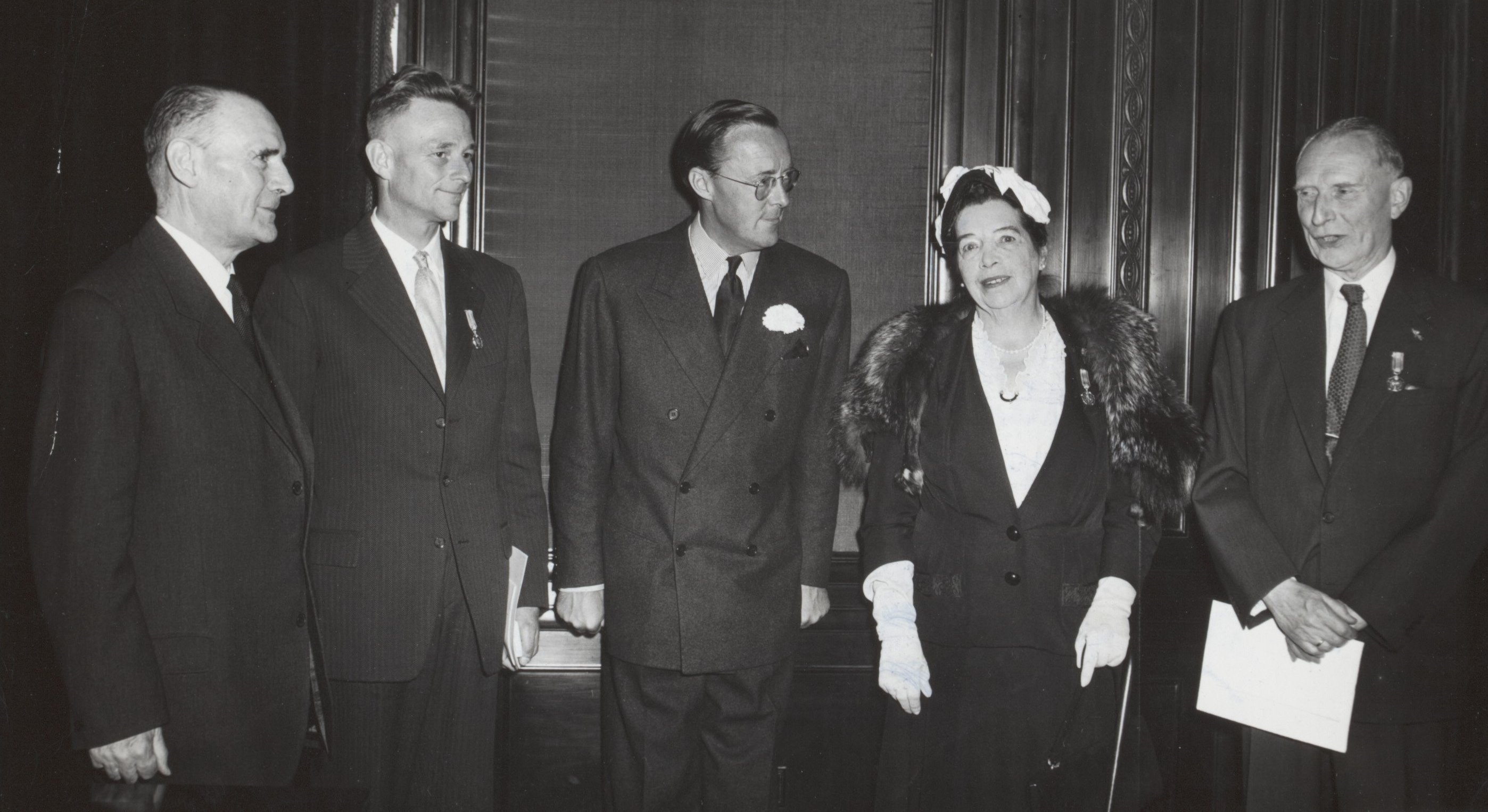 Uitreiking Zilveren Anjer 1956. V.l.n.r. Edgar Blancquaert, Ludolf Dirk Broekema (1911-1979), prins Bernhard, mw J.E. Westendorp-Osieck, Frits Lugt. Datum 28 juni 1956